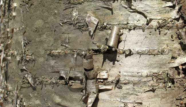 River Birch.